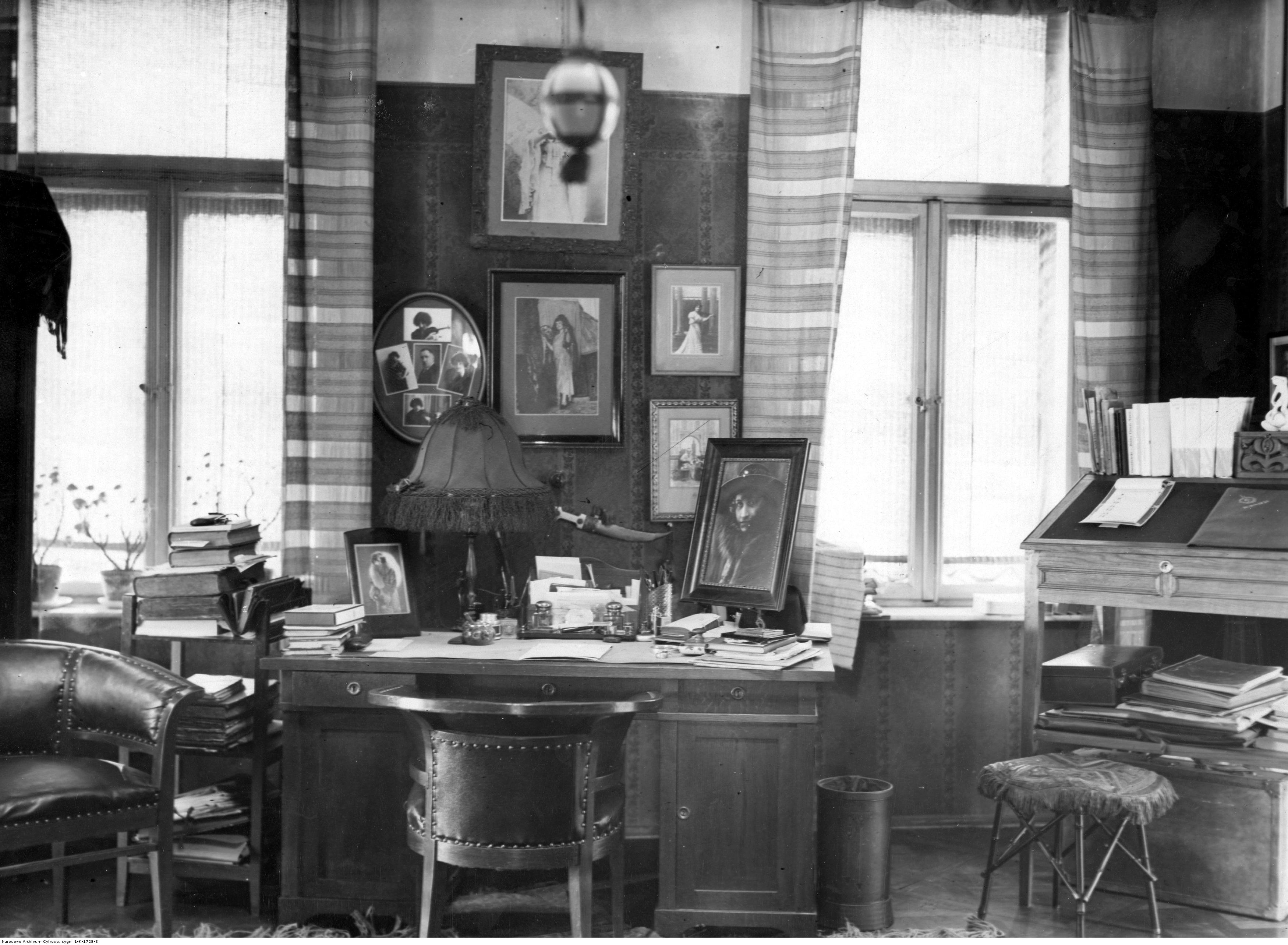 Mieszkanie Ferdynanda Ossendowskiego. Fragment wnętrza: gabinet pisarza. Warszawa przed 1939 (Koncern Ilustrowany Kurier Codzienny - Archiwum Ilustracji)